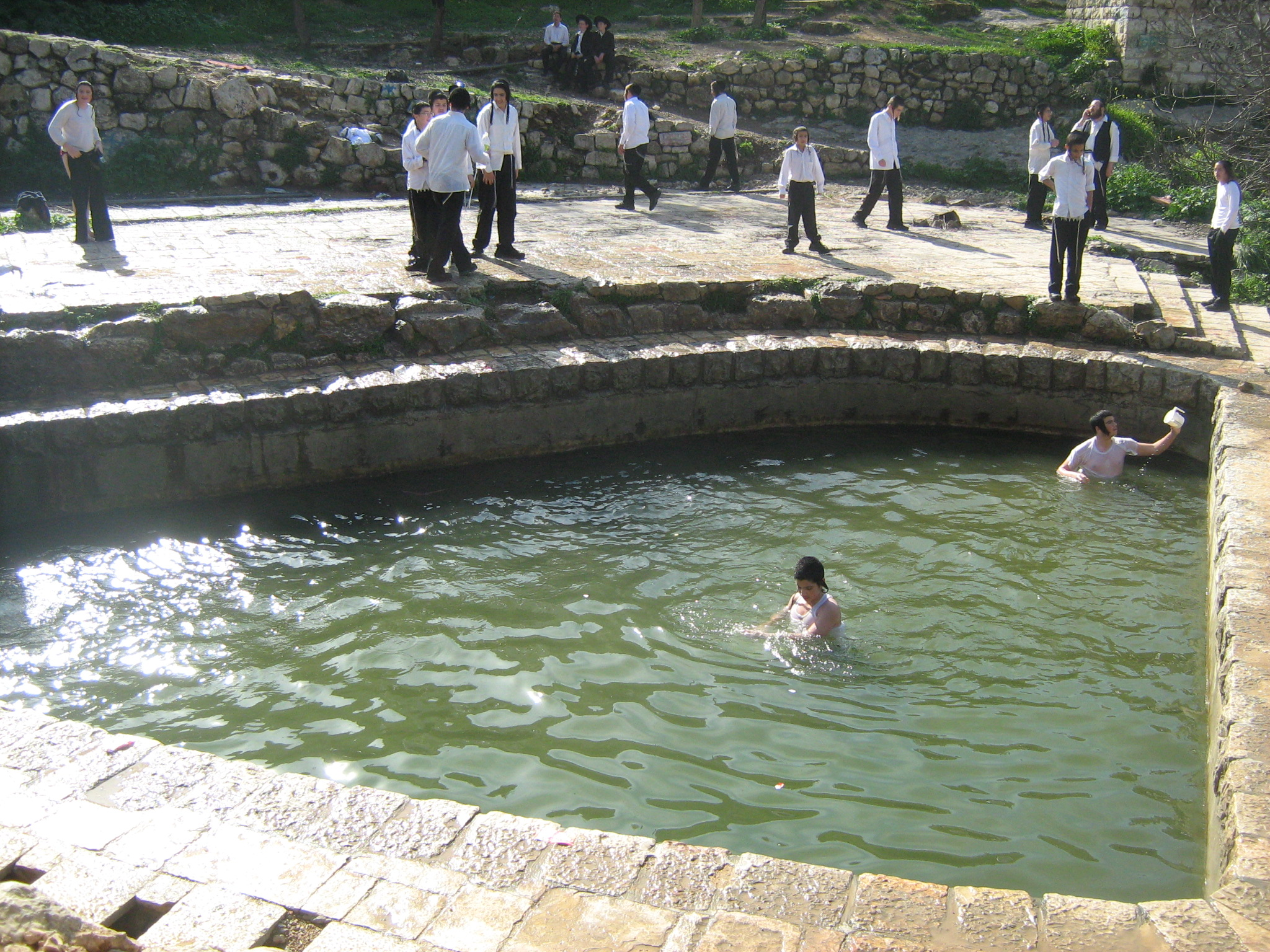 Lifta